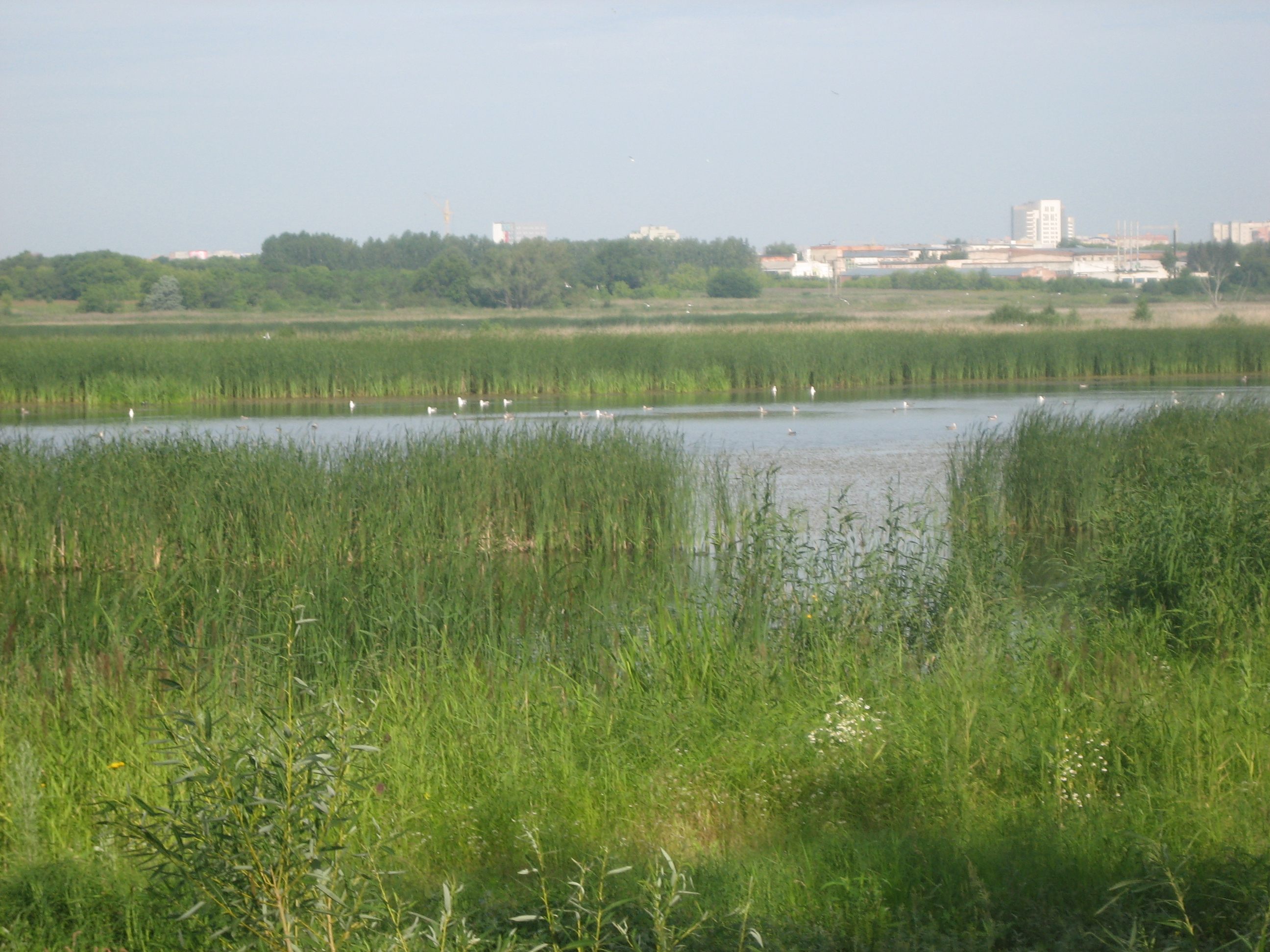 Птичья гавань — природный парк, расположенный в черте города Омска, особо охраняемая территория, наделённая статусом объекта регионального значения. Находится на берегу реки Иртыш в Кировском административном округе города Омска. Объявлен памятником природы с охранным статусом решением Омского облисполкома в 1979 году. Экологически чистый уголок природы, расположенный между международным аэропортом «Омск-Центральный» и Ленинградским мостом, призван областной властью стать визитной карточкой города. После реконструкции планируется придать ему статус заповедника федерального значения. Птичья гавань — это природно-антропогенное сообщество, имеющее важное значение для экологического каркаса Омска. Находится на пути миграции птиц и во время осенних перелётов на водоёмах останавливается до трёх тысяч особей, является объектом научных исследований омских учёных